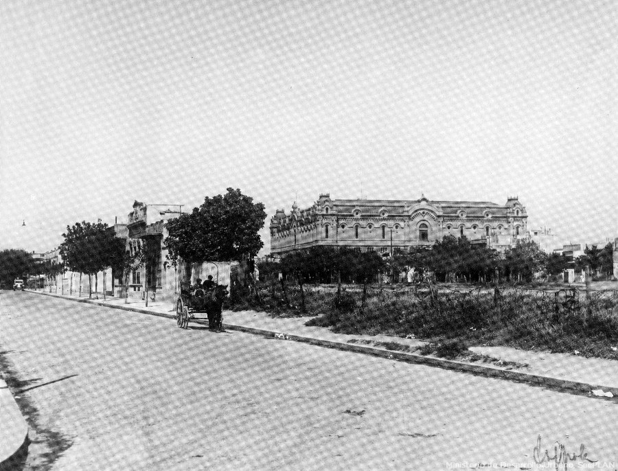 Vista del barrio de Caballito con la planta de aguas corrientes de la avenida Pedro Goyena, en la década de 1920. Se puede ver el ambiente suburbano que tenía la zona por esa época todavía.